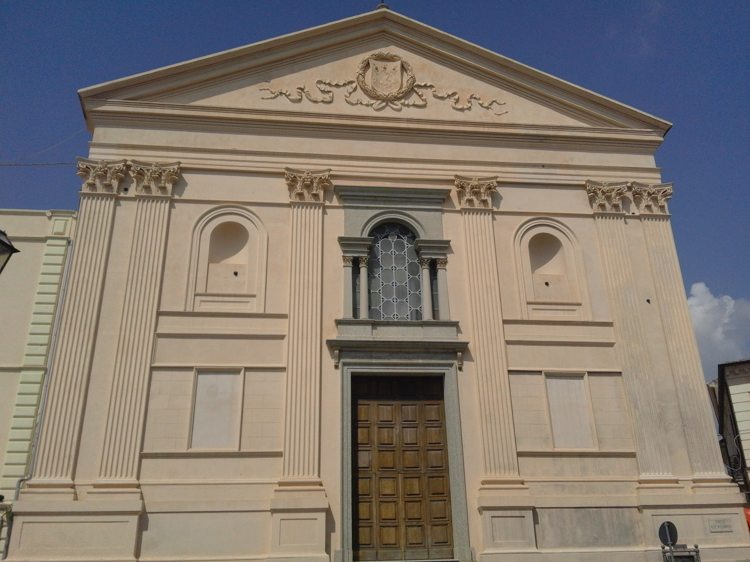 Chiesa e convento della SS. Annunziata o di S. Domenco seu del SS. Rosario